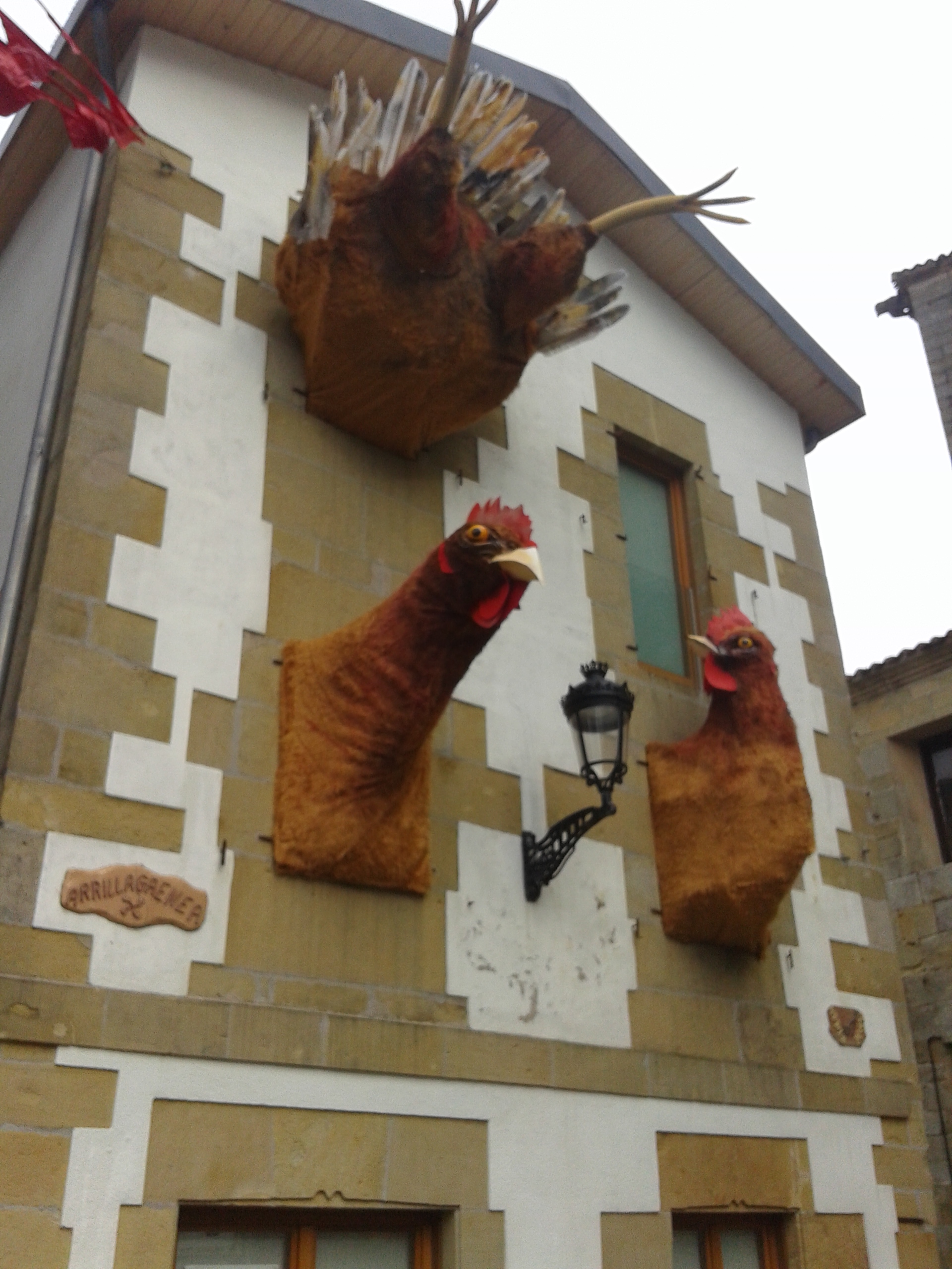 Urtero apainketa desberdin bat egiten da herrian.